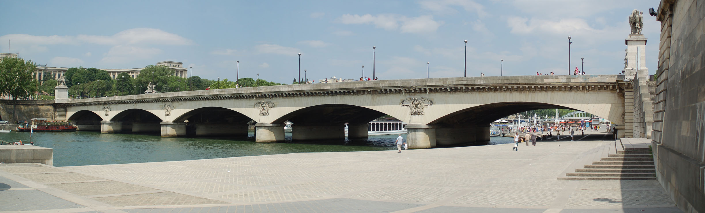 Le pont d'Iéna, à Paris, France.